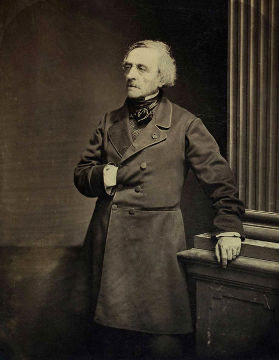 Photographic portrait of Jean-Jacques Ampère; Département des Estampes - BNF